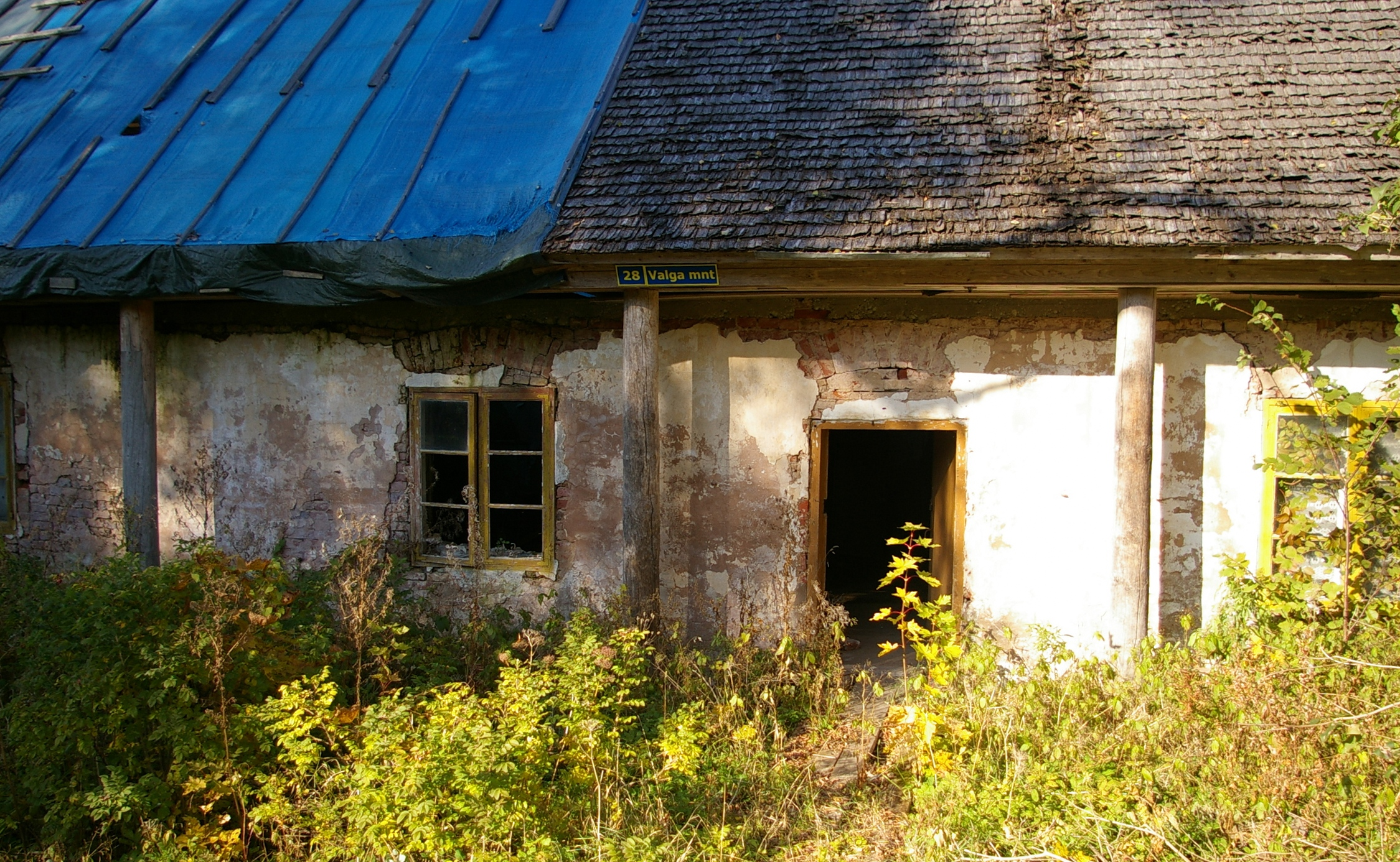 Voltveti kõrtsihoone fassaad ja sammastik. Vaade lõunast. Asukoht: Pärnu maakond, Saarde vald, Tihemetsa alevik Valga mnt 28